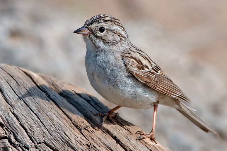 Brewer's Sparrow (Spizella breweri), Cabin Lake Viewing Blinds, Deschutes National Forest, Near Fort Rock, Oregon